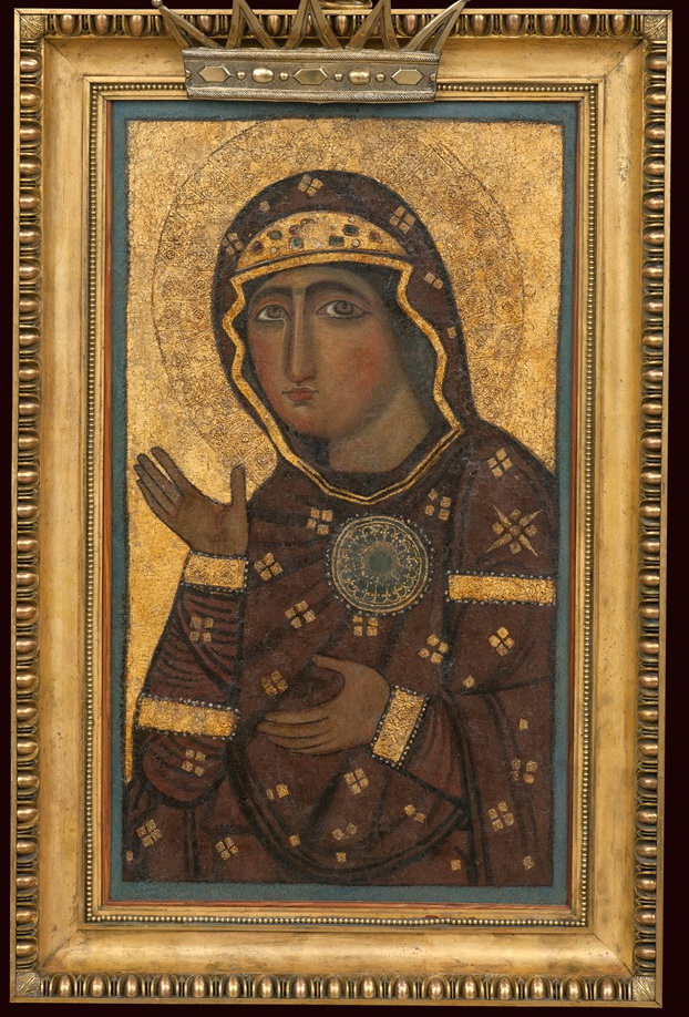 Богоматерь